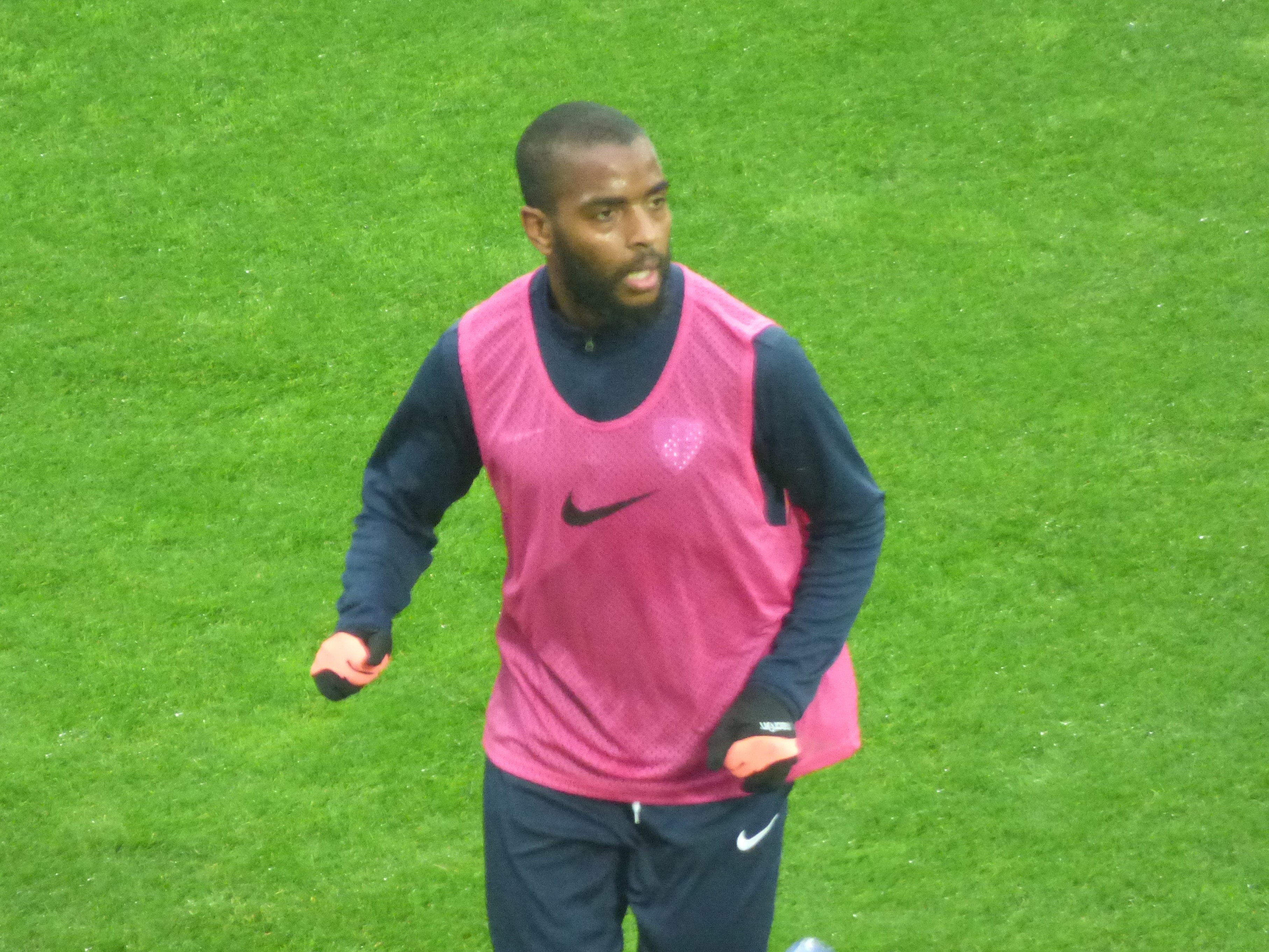 Youssouf M'Changama avant le match RC Lens / Grenoble Foot 38, le 24 novembre 2018, comptant pour la quinzième journée du championnat de France de football de Ligue 2 2018-2019, au Stade Bollaert-Delelis.